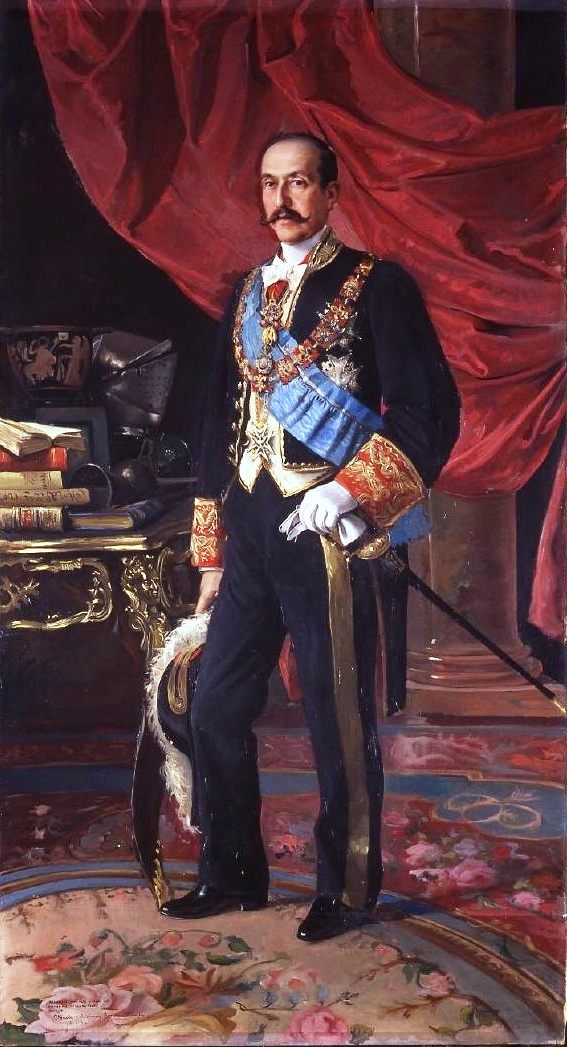 Retrato del aristócrata español Enrique de Aguilera y Gamboa (1845-1922), XVII marqués de Cerralbo, Grande de España y caballero de la Orden del Toisón de Oro.